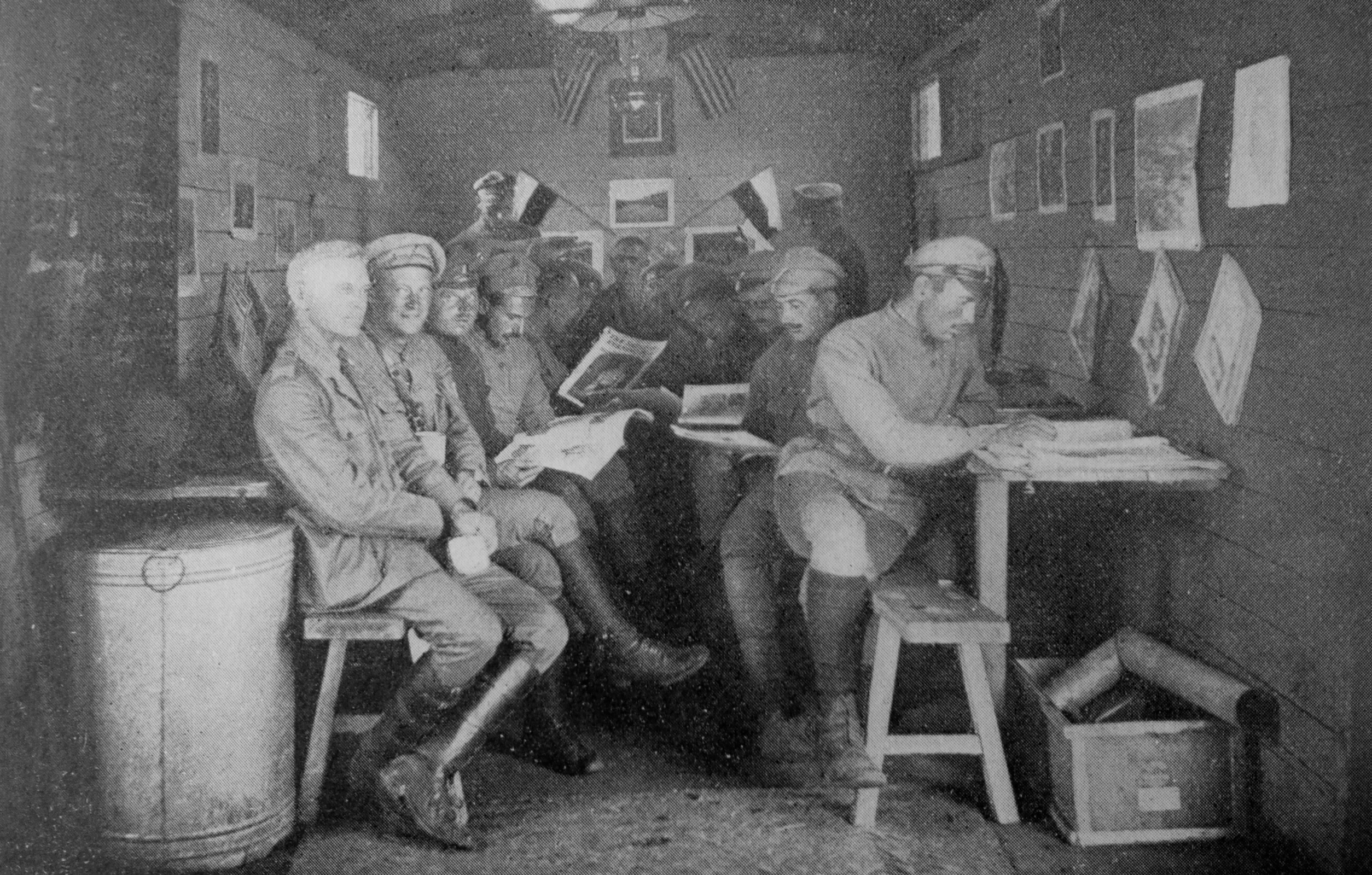 Jekatěrinburk - čajovna strýčka z Ameriky. Československé legie v Rusku, foto kolem 1918-1920